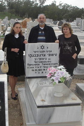 біля надгробка заслуженого вчителя України Чорнобабенка Тимофія Тимофійовича